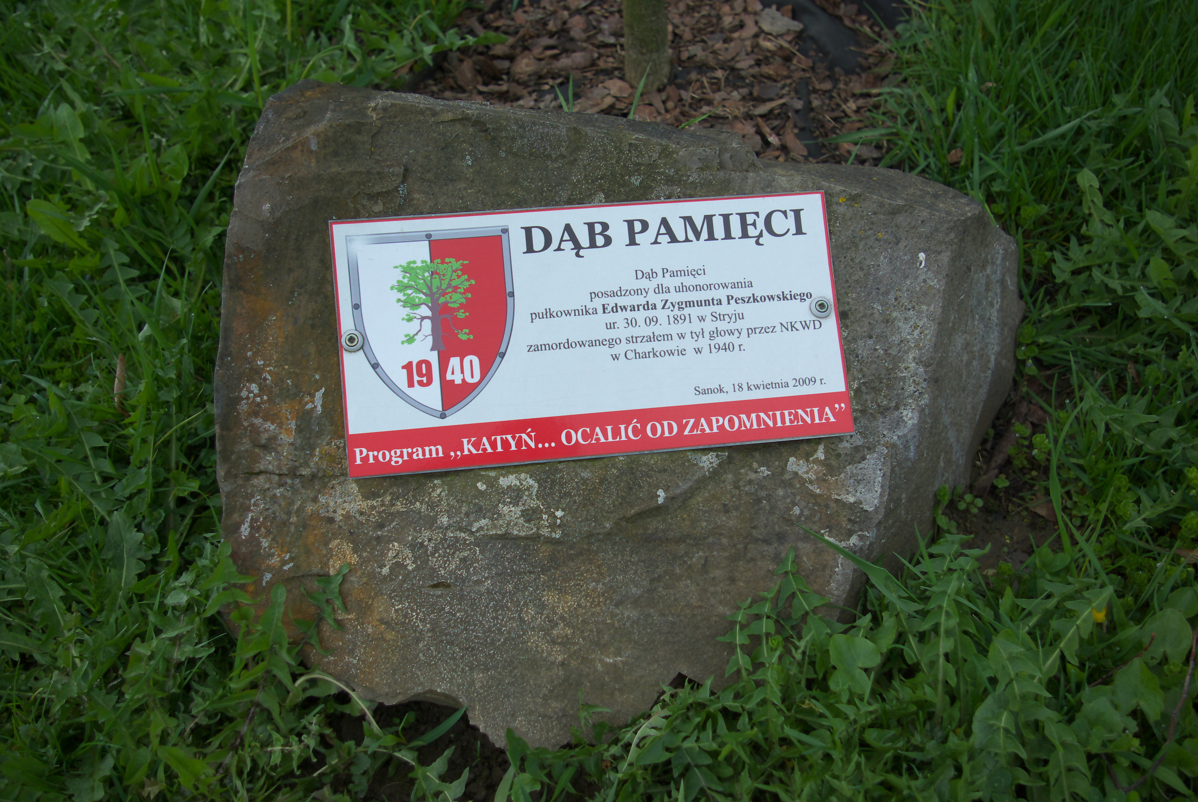 Kamień pamiątkowy przy Dębie Pamięci honorującym Edwarda Peszkowskiego na Cmentarzu Centralnym w Sanoku